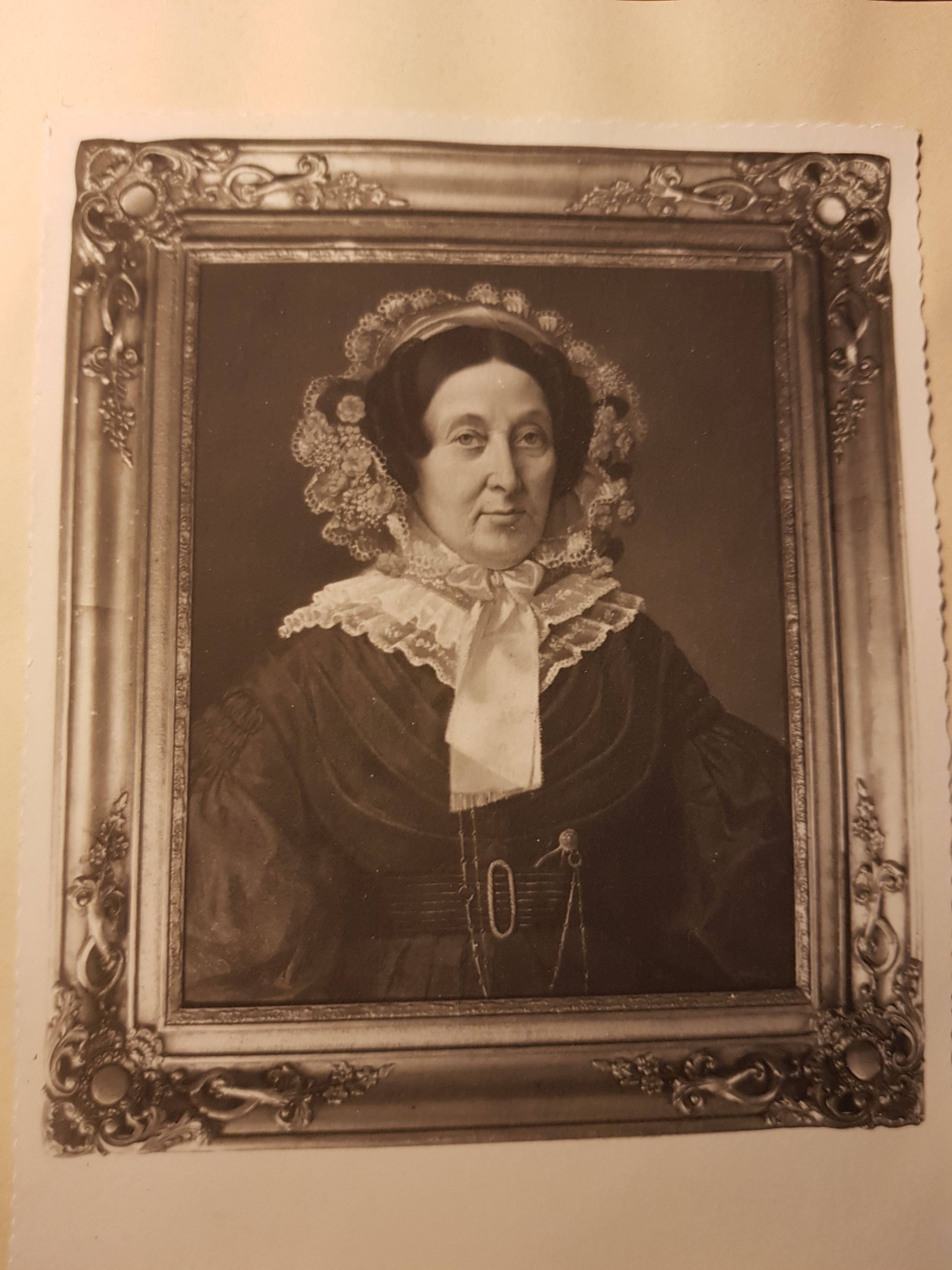 Rose Esther DUBOIS-DESCOURS de la MAISONFORT (1771-1850), veuve du comte François Ignace CARPENTIER DE CHANGY, adulte